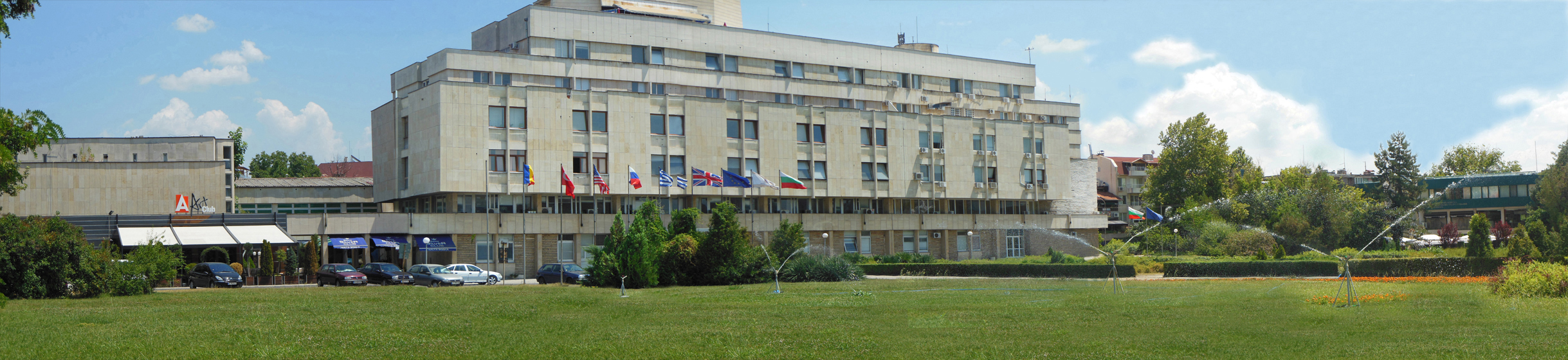 сградата на общинското управление в град Кърджали